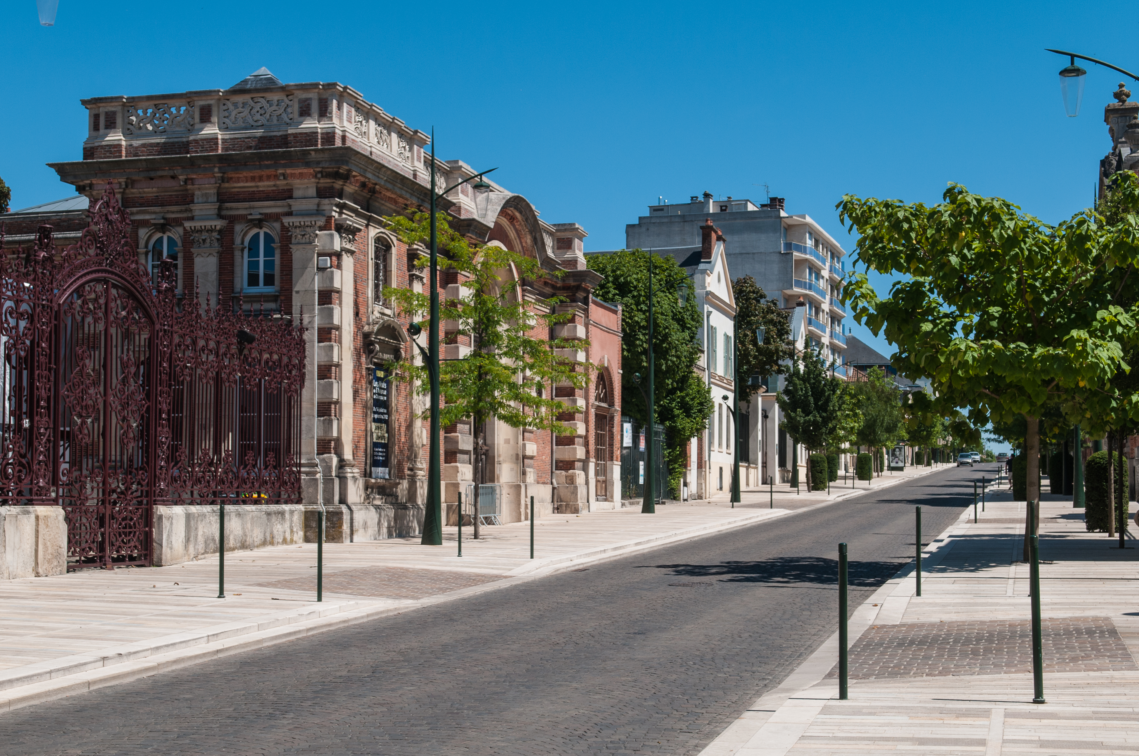 Avenue de Champagne, Épernay